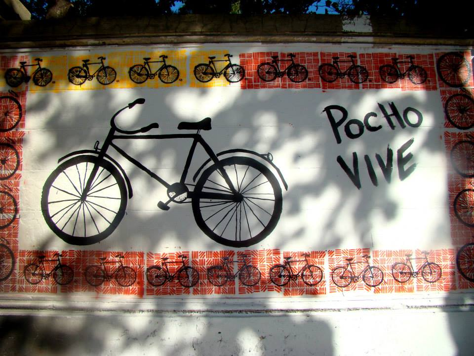 Mural en las paredes del Hospital Alvear del Barrio de La Paternal (Buenos Aires)